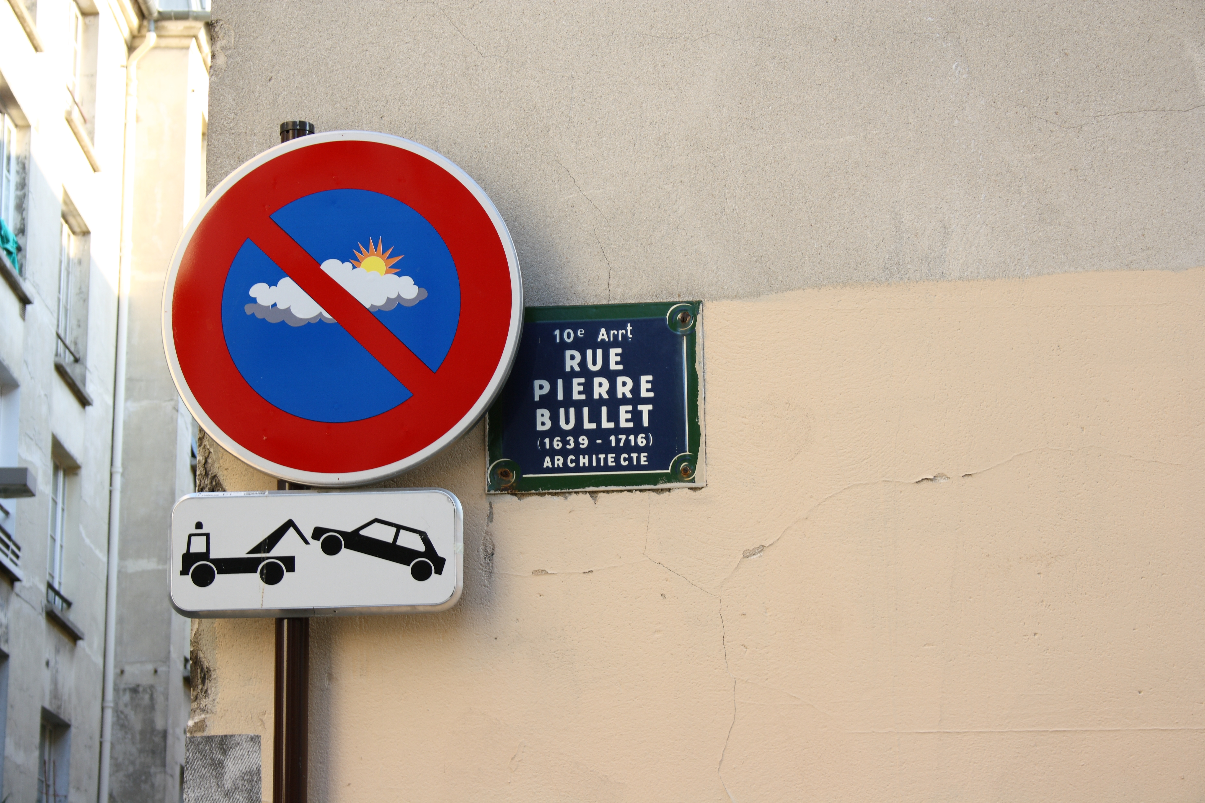 Straßenschild Rue Pierre Bullet im 10. Arrondissement von Paris